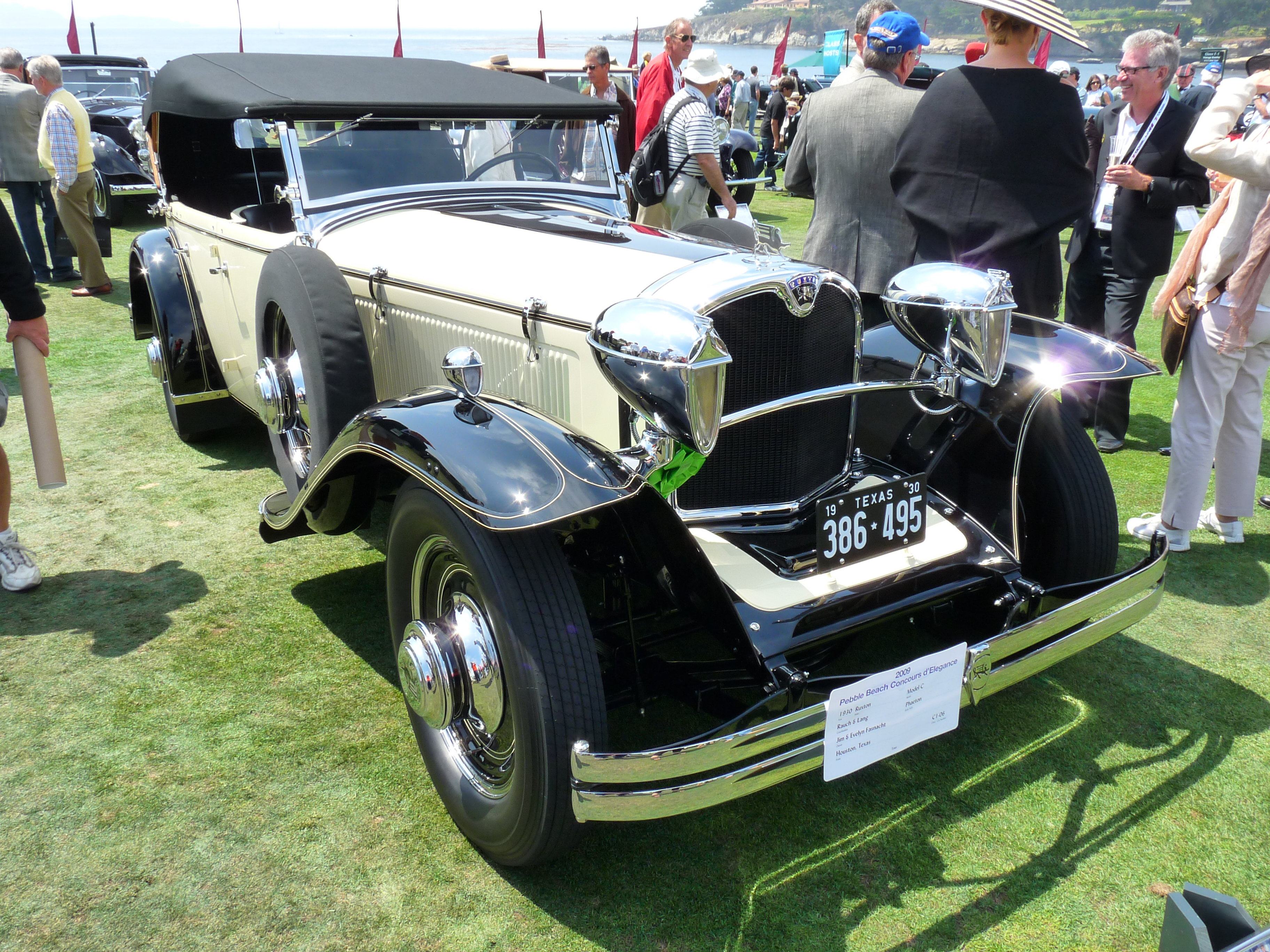 1930 Ruxton Model C Rauch & Lang Phaeton